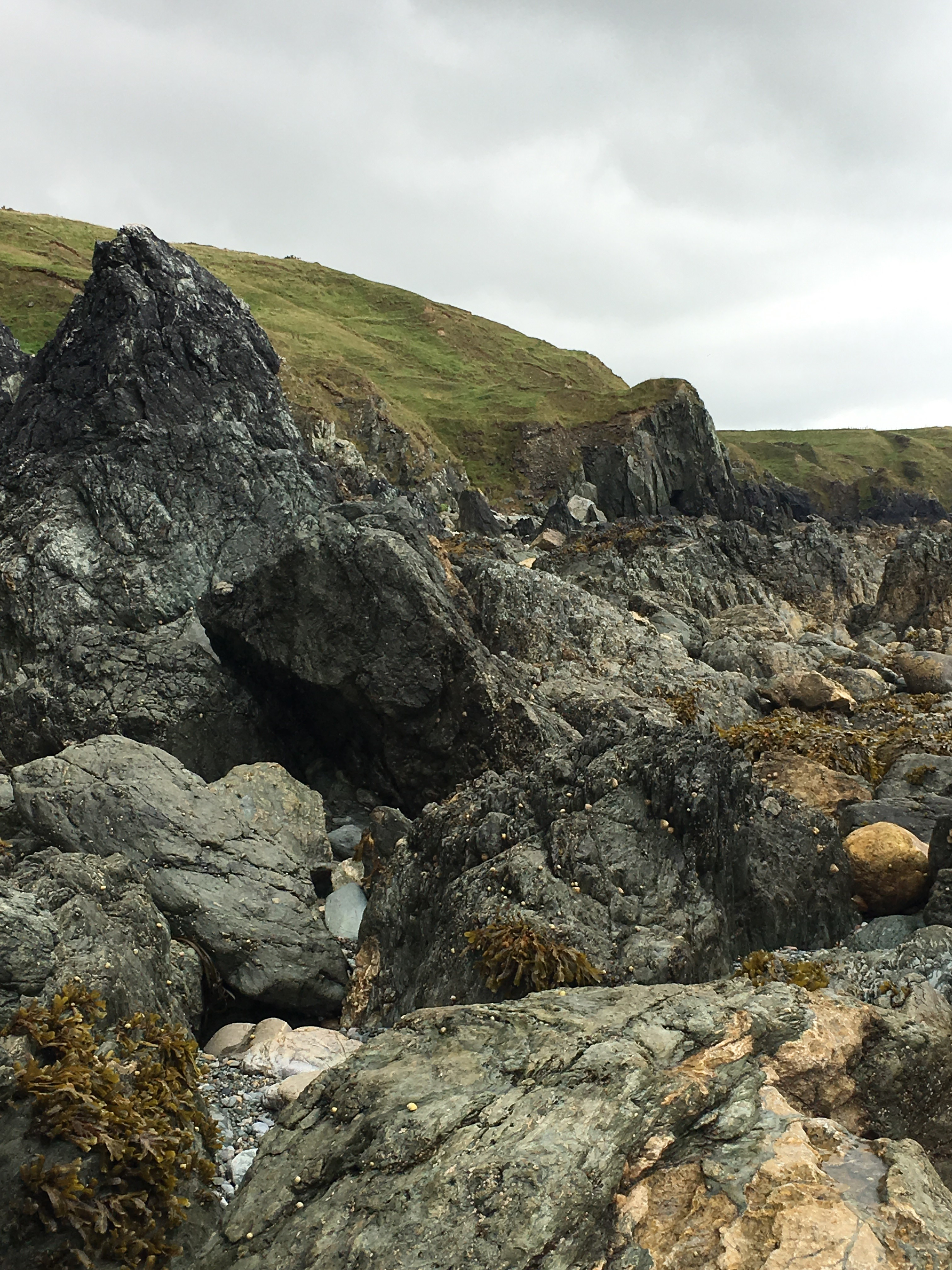 Tirlun creigiog rhan o Borth Ty Mawr.